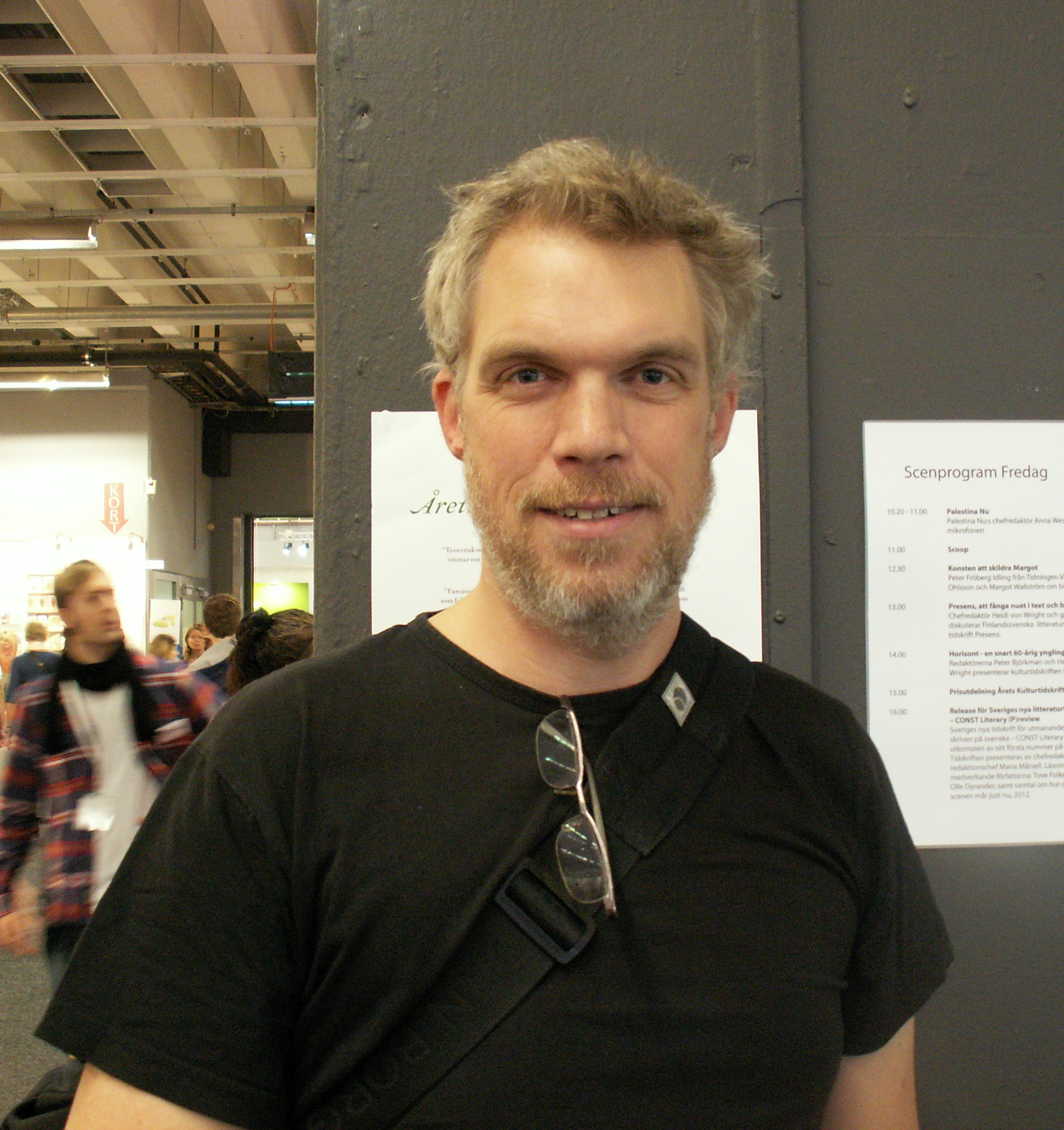 Magnus "Mojo" Olsson, serieskapare och illustratör från Göteborg.